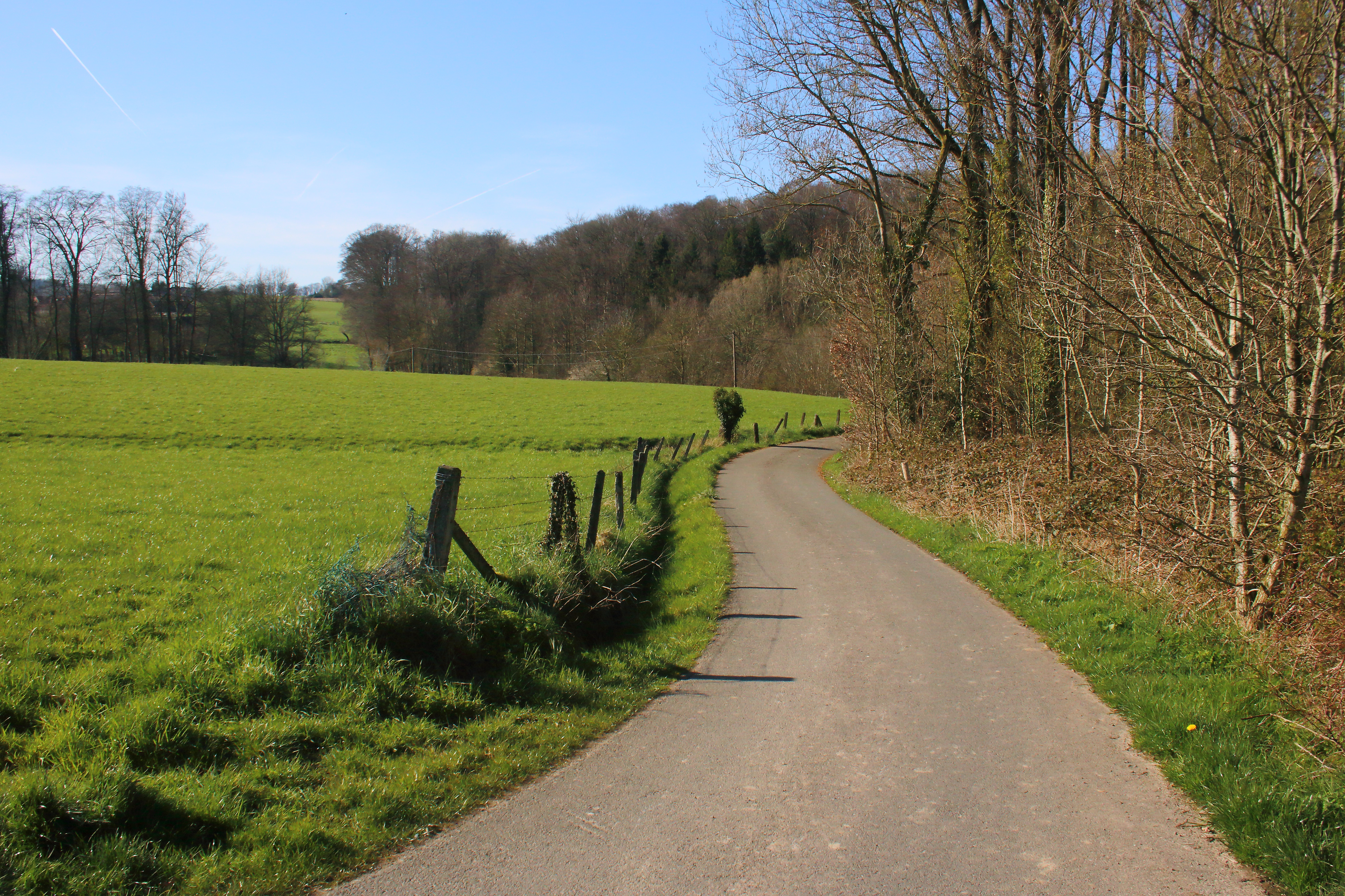 Trimpont, Everbeekse bossen, Everbeek, Brakel, Vlaanderen, België